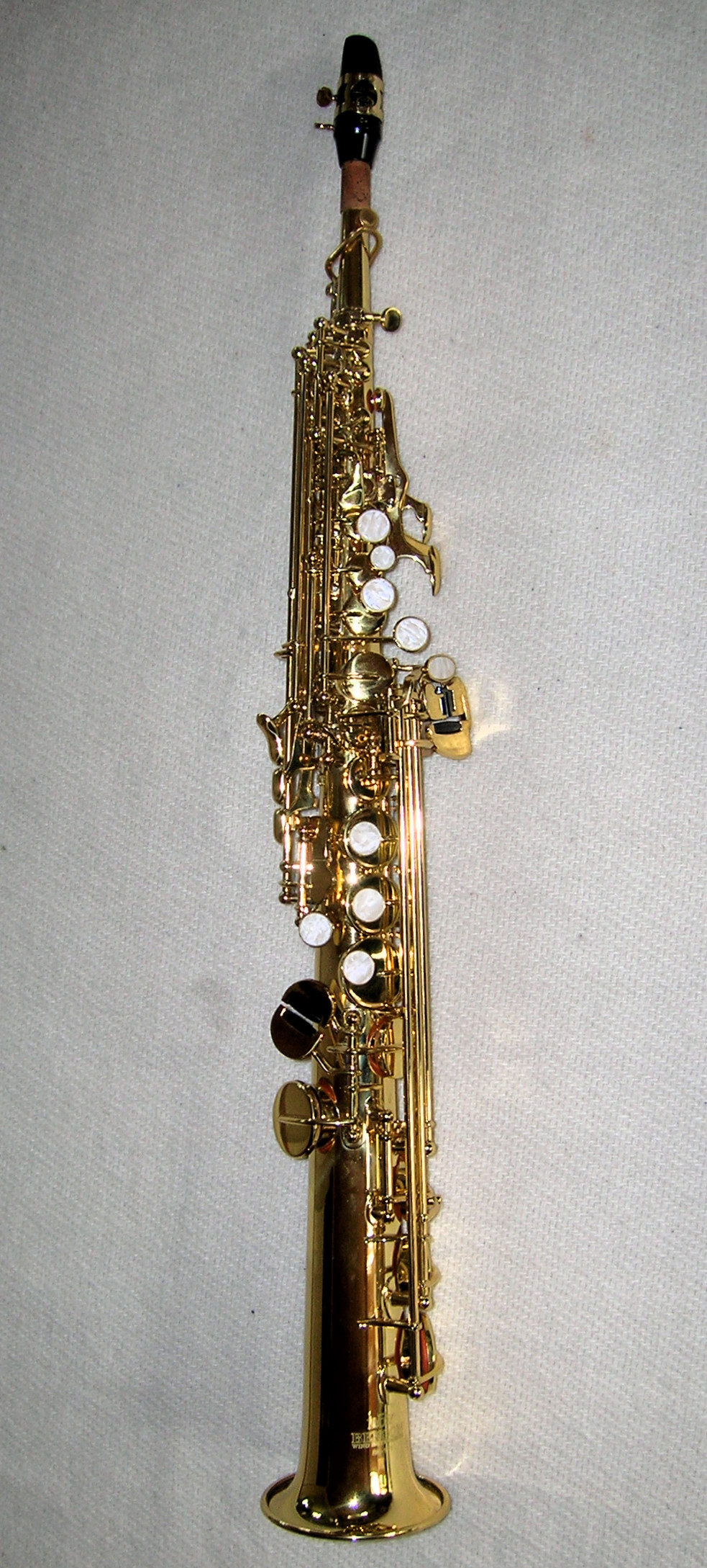 A soprano saxophone